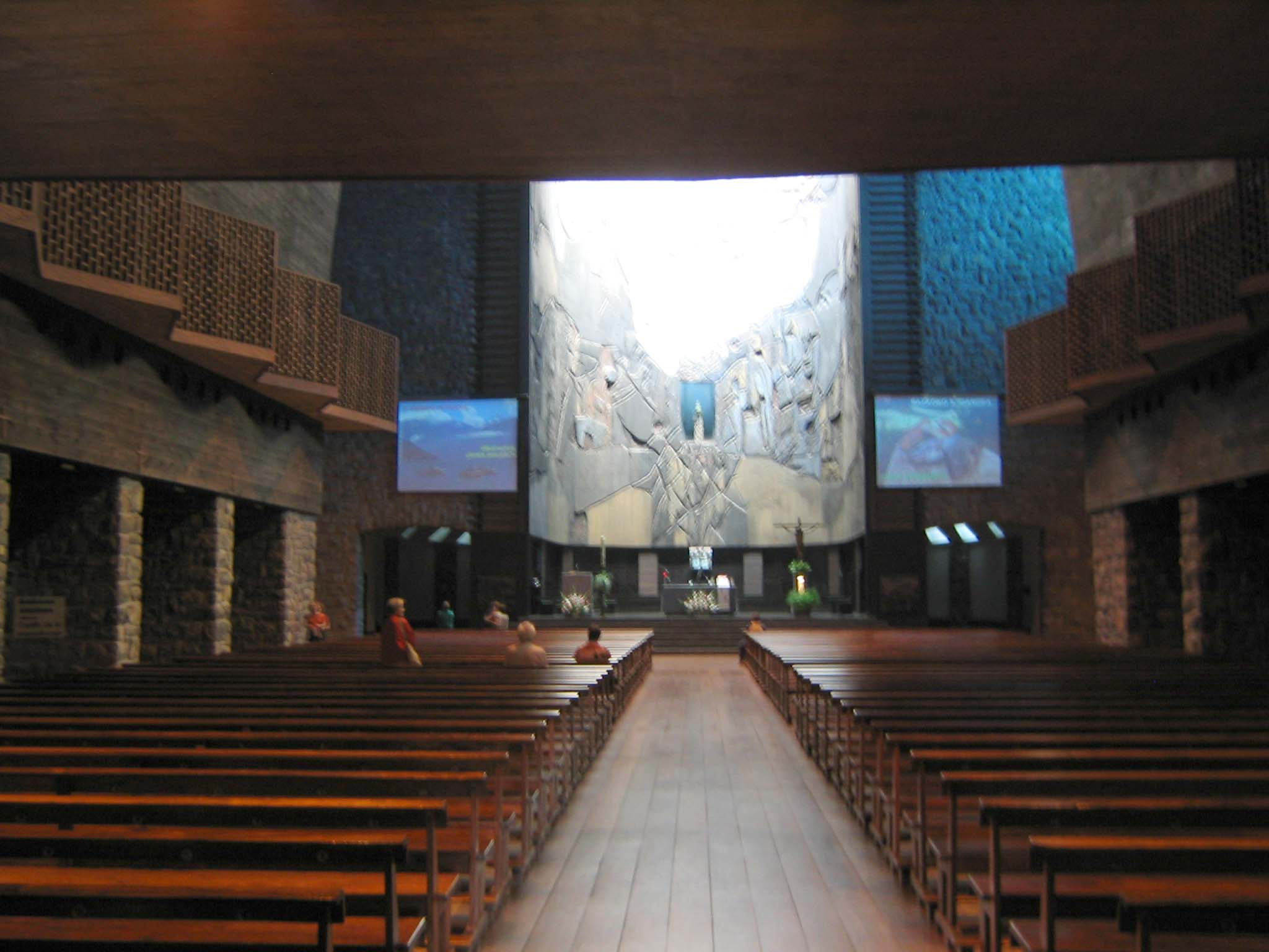 Irudia/Image: Arantzazu santutegia, Oñati, Gipuzkoa